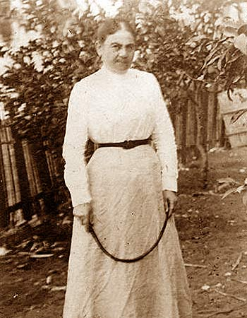 אולגה אוחזת בשוט ששימש אותה להגנה עצמית